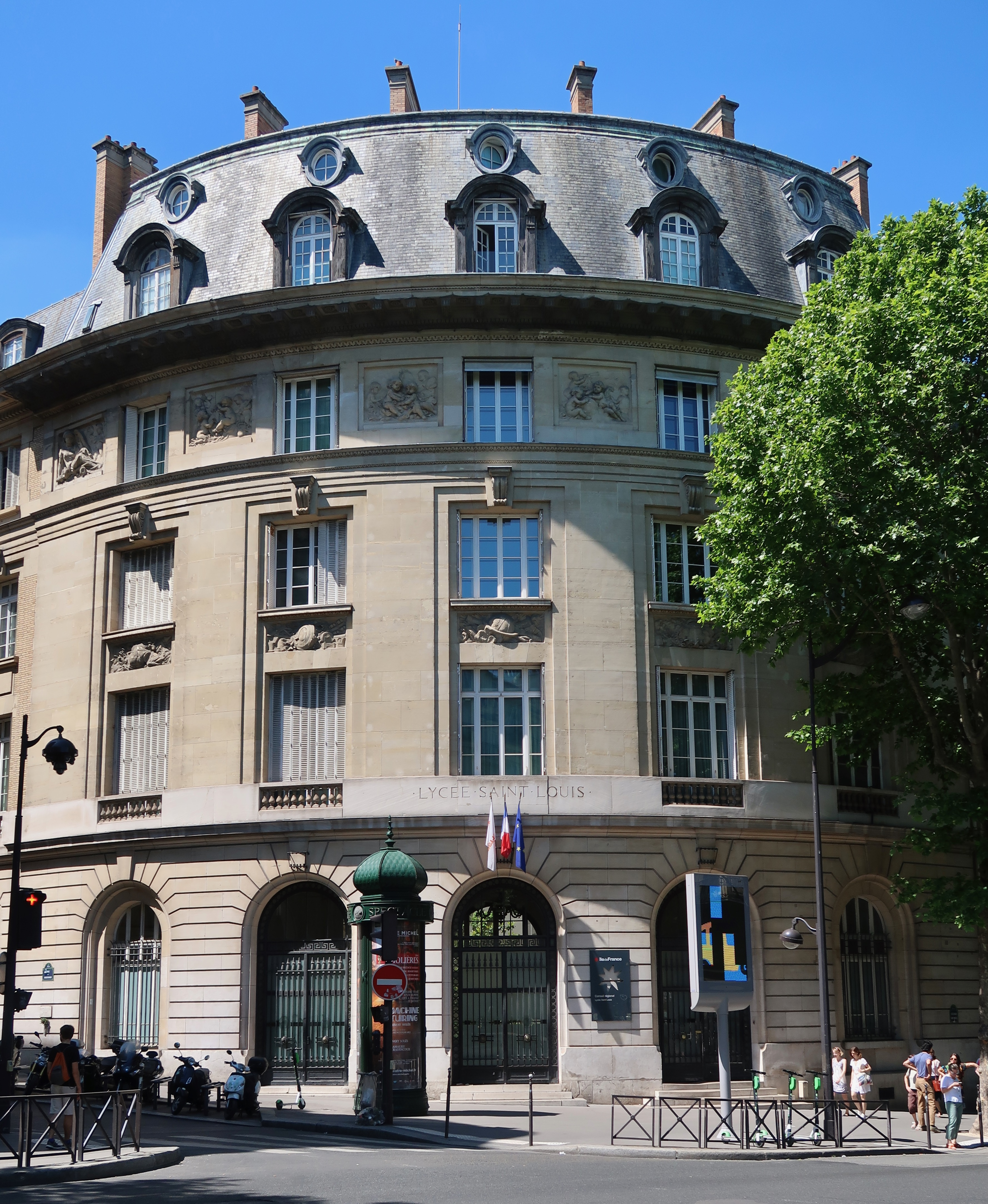 Lycée Saint-Louis, 44 boulevard Saint-Michel (Paris, 6e).